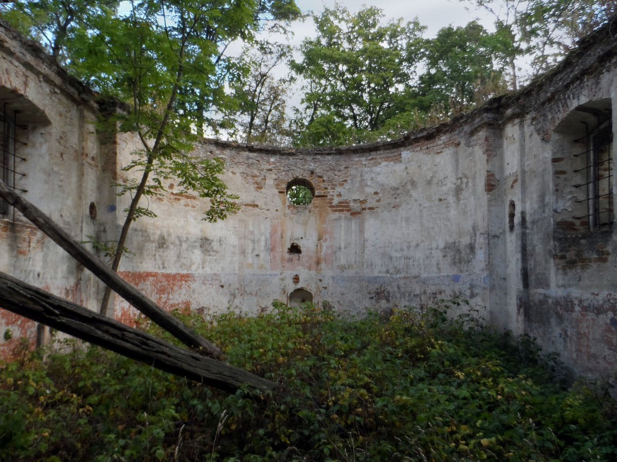 Язвіны. Касцёл Святога Духа